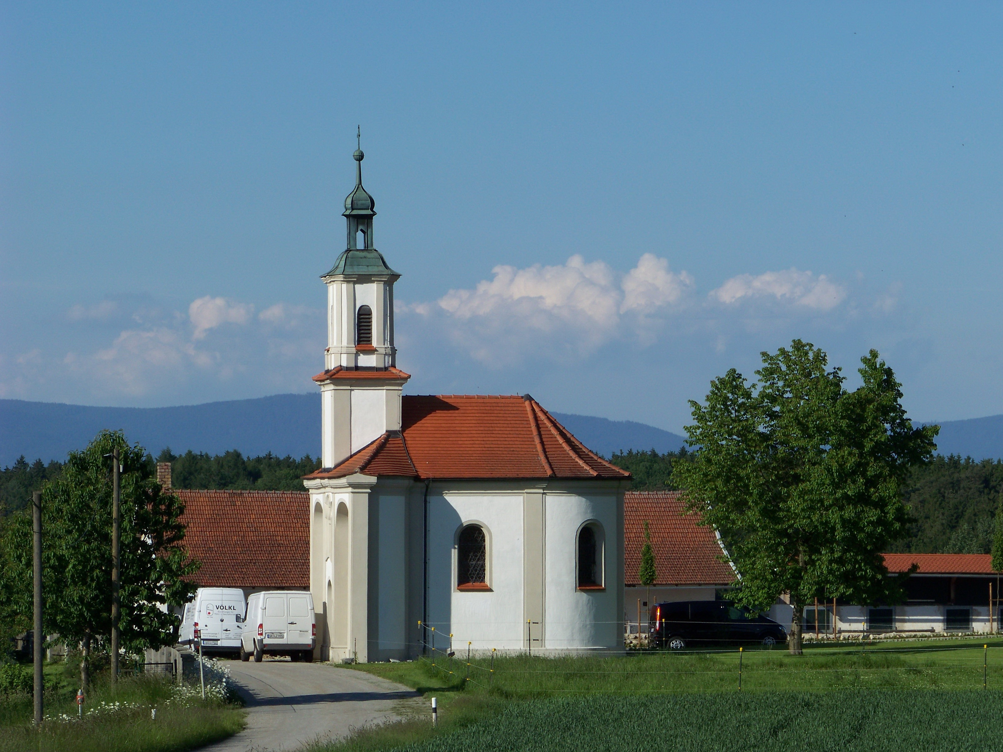 Oberschneiding, Hienhart. Katholische Schlosskapelle Schmerzhafte Muttergottes, origineller Bau von 1730; mit Ausstattung.